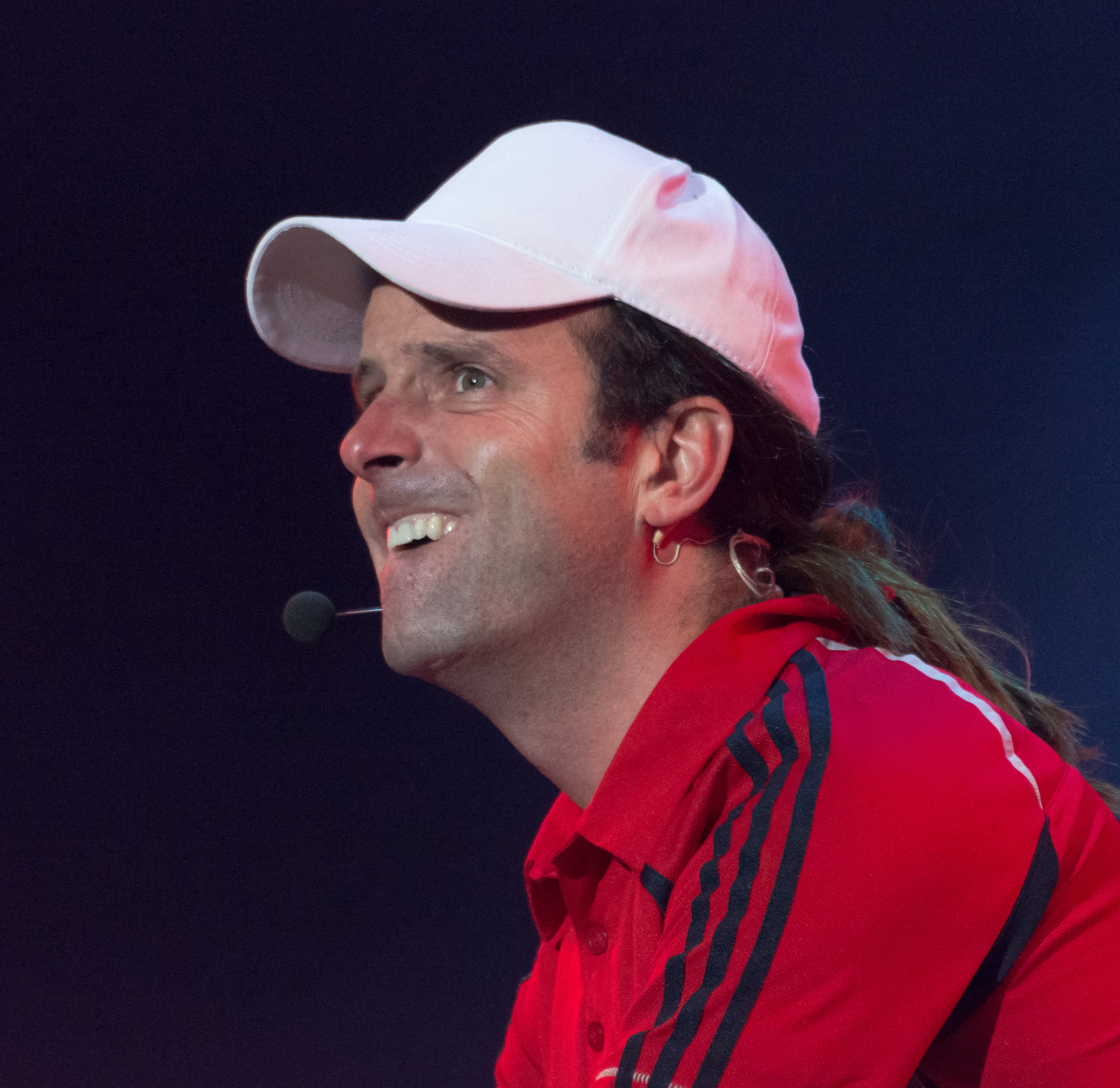 Expo Quillota 2020, Estadio Municipal Lucio Fariña Fernández, Quillota, Región de Valparaíso, Chile